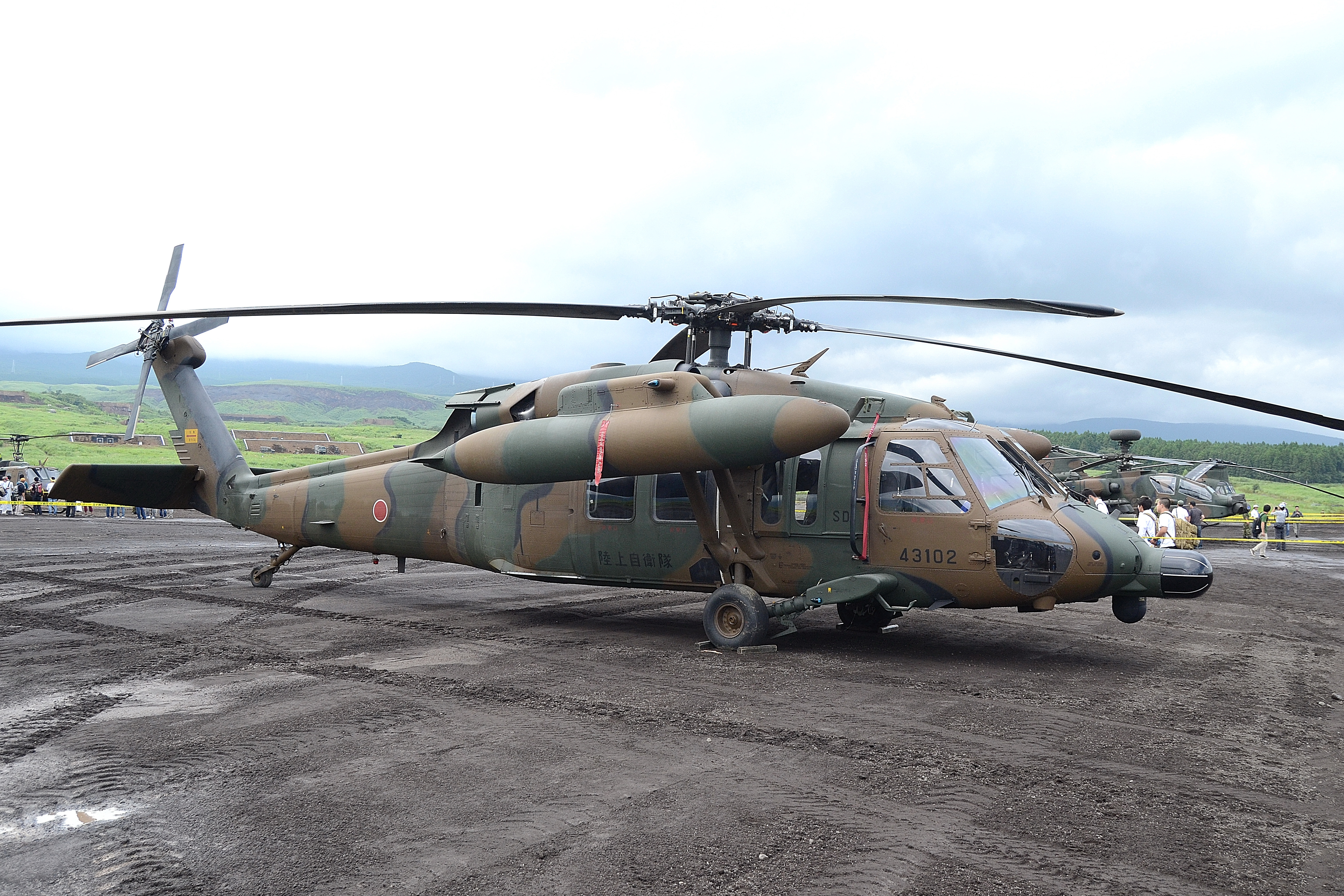 陸上自衛隊のUH-60JA（2015年の東富士演習場で行われた富士総合火力演習において撮影）